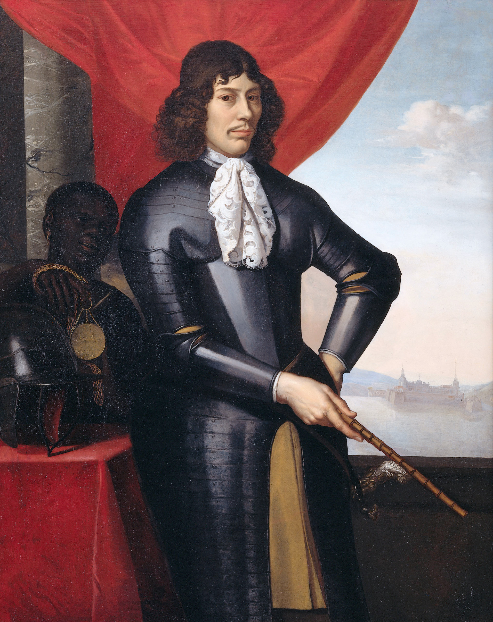 Pendant of File:Dina Lems ( -1675) by Daniel Vertangen.jpg